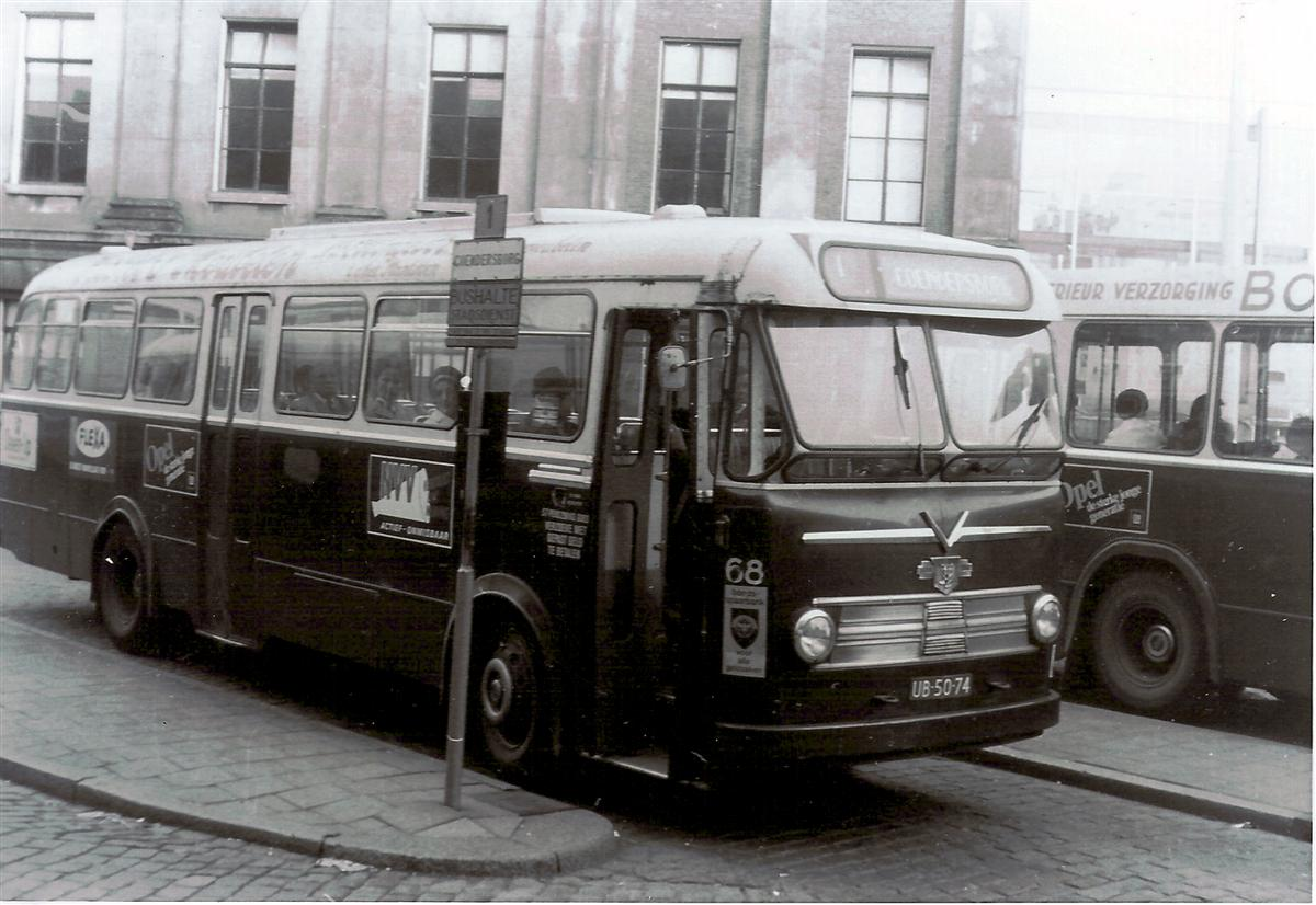 Stadsbus op de Grote Markt, zomer 1971 Gemeentelijk Vervoerbedrijf Groningen (GVG) bus 68, Verheul / Leyland TC LOPSUC 1/1